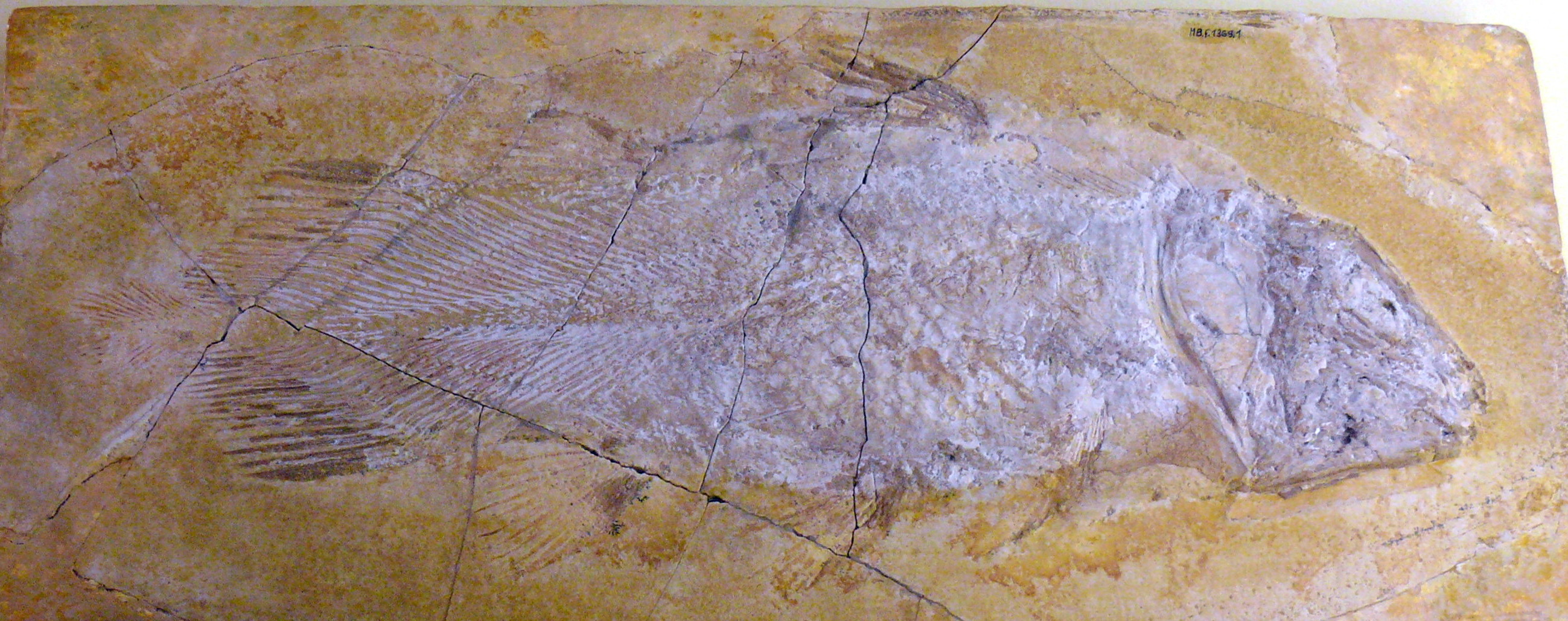 Undina penicillata (MÜNSTER), Upper Jurassic, Germany